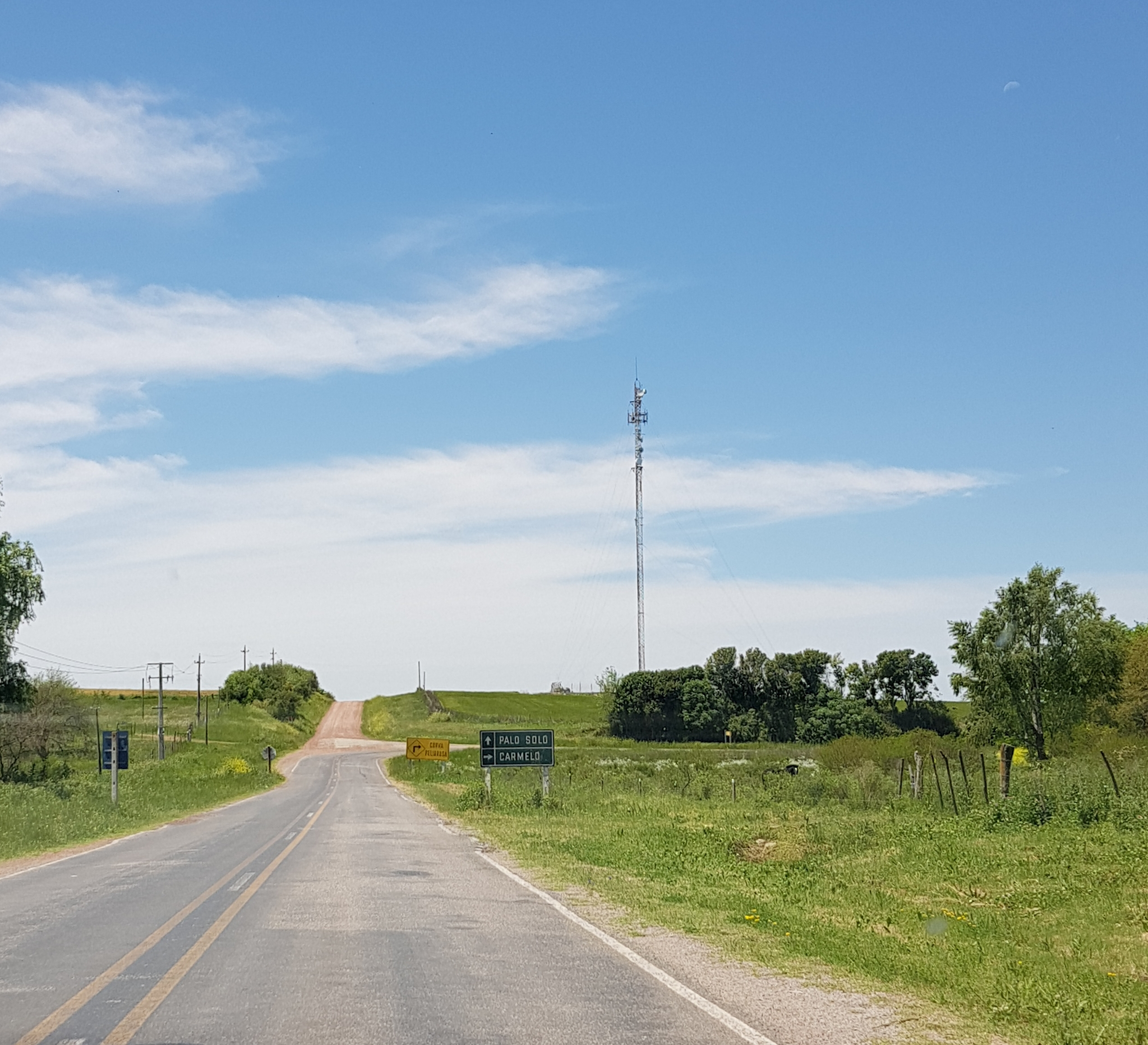 Ruta 97 en el departamento de Colonia, Uruguay